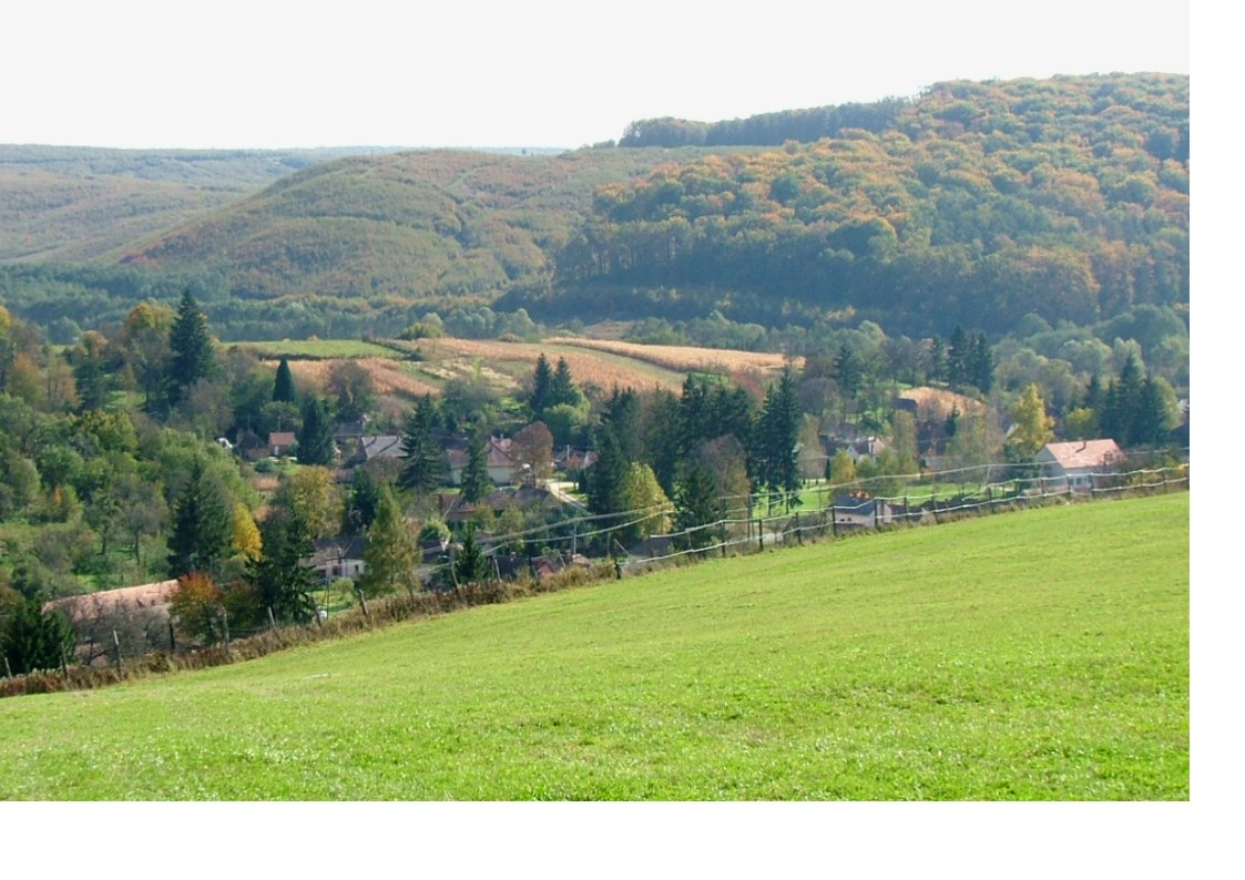 Szentpéterfölde látképe, saját kép